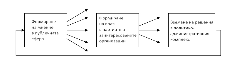 Графично изображение на концепцията за "циркулация на властта" на Юрген Хабермас от анализа на Джон Ерик Фосум и Филип Шлезинджър от 2007 година „The European Union and the Public Sphere. A Communicative Space in the Making?“ - адаптация на български език